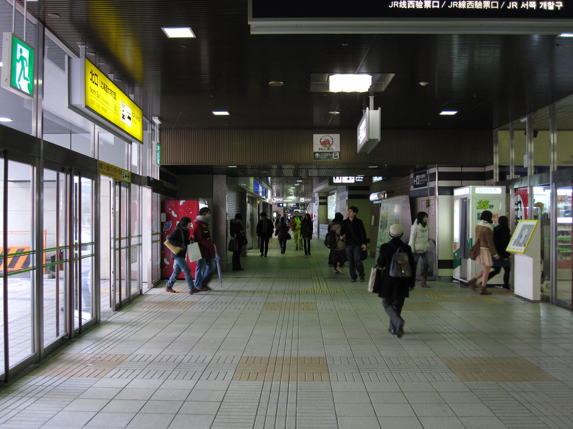 札幌駅北口通路（JR北海道函館本線）